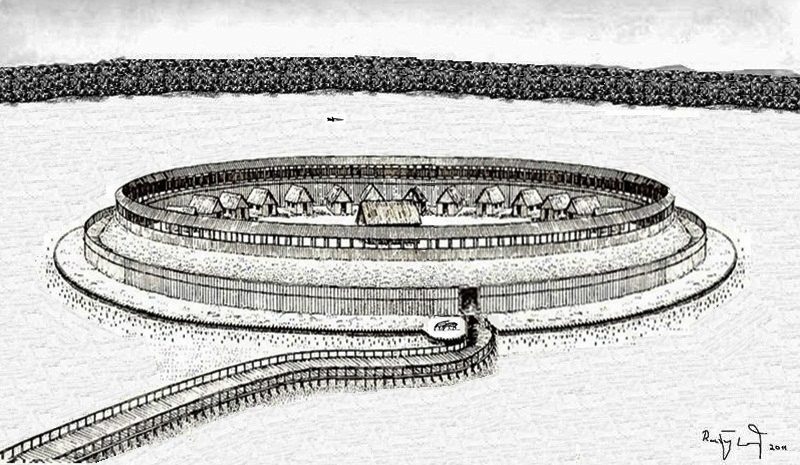 Burgwallinsel Hanfwerder; Rekonstruktionsversuch